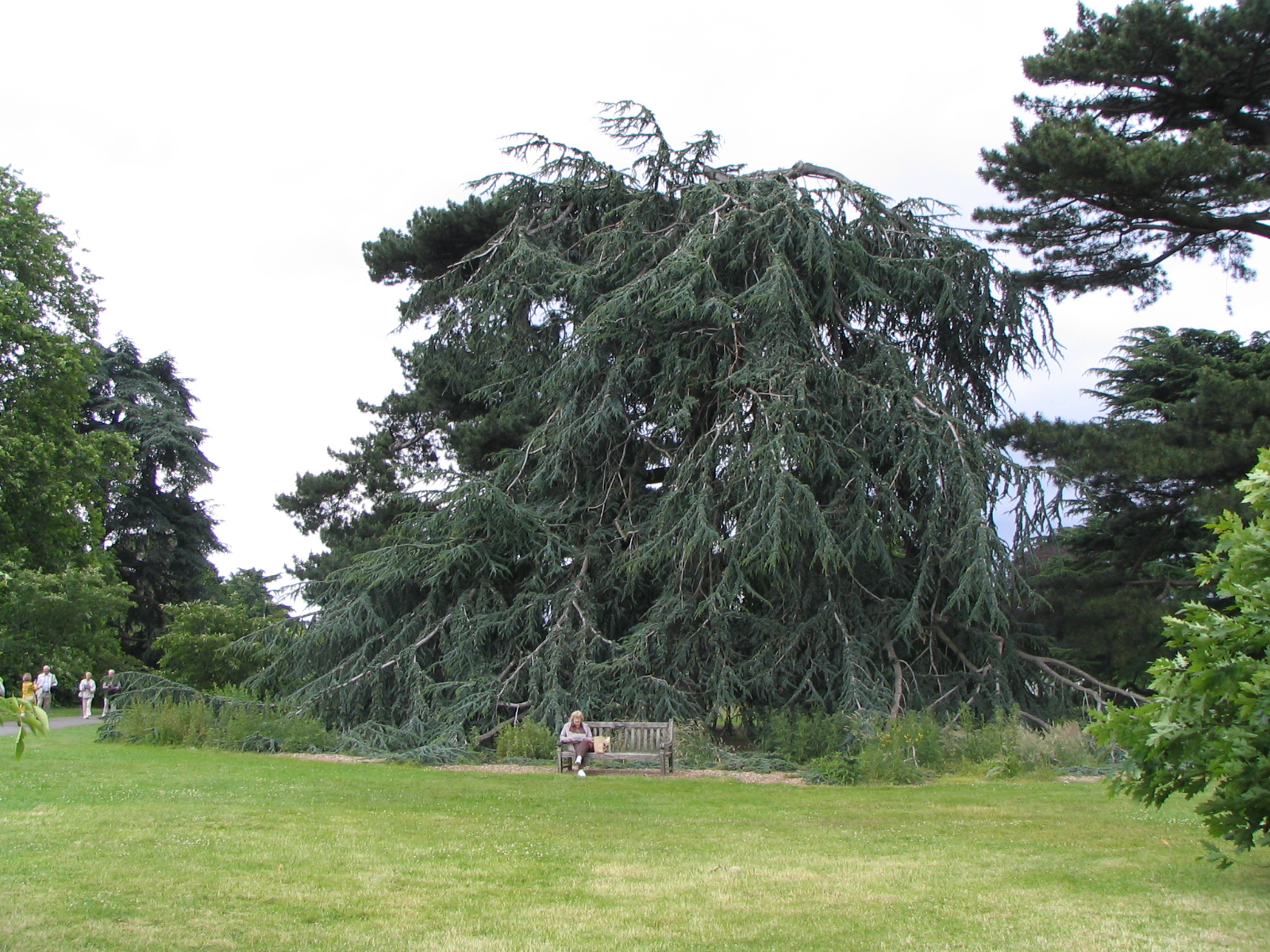 Cedrus_atlantica 'Glauca_Pendula', Kew Gardens, London (author: Mihailo Grbić).